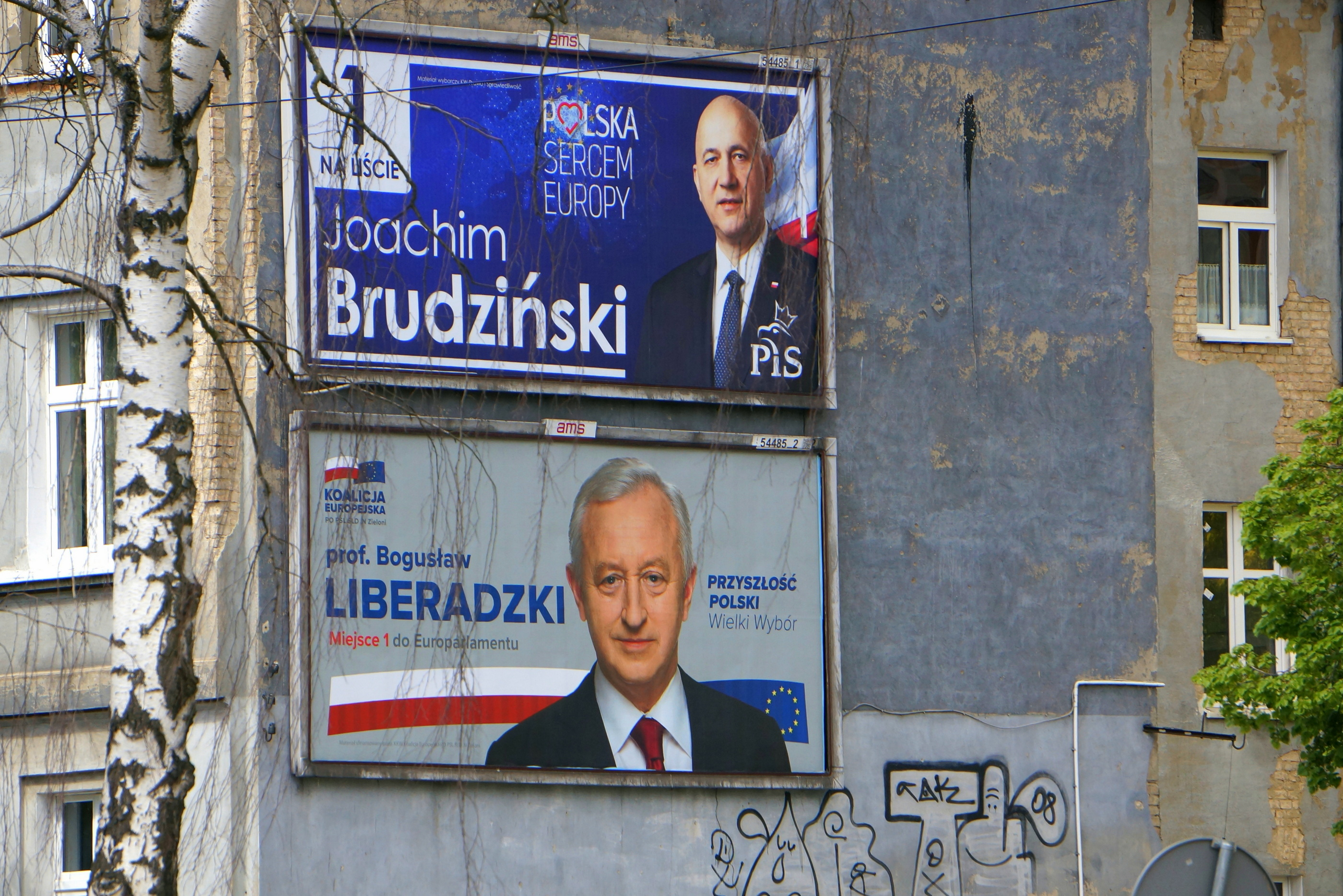 Gorzów Wlkp., ul. Jagiellończyka. Billboardy w kampanii do Europarlamentu w 2019, Koalicji Europejskiej i PiS